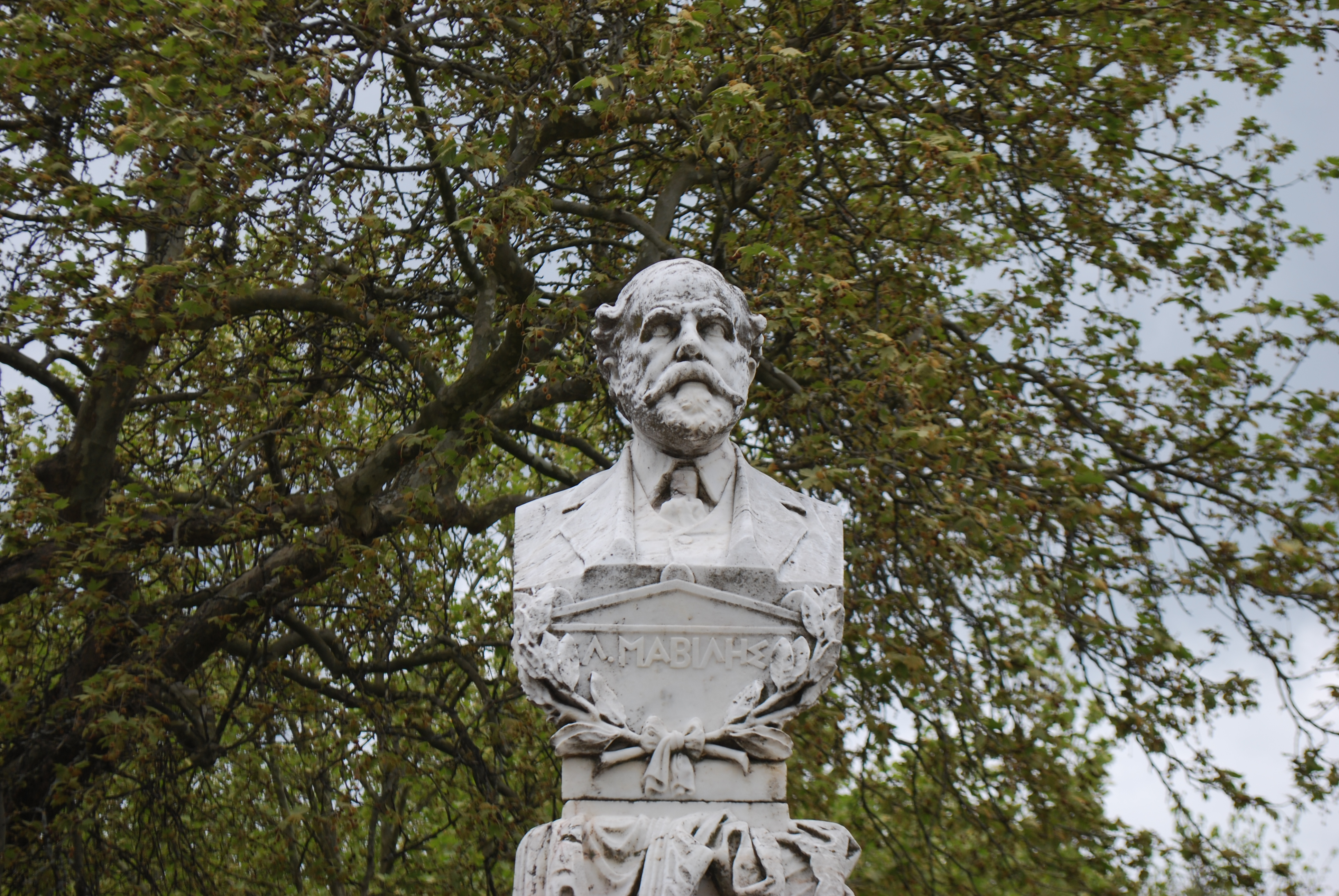 Vue de Ioannina.